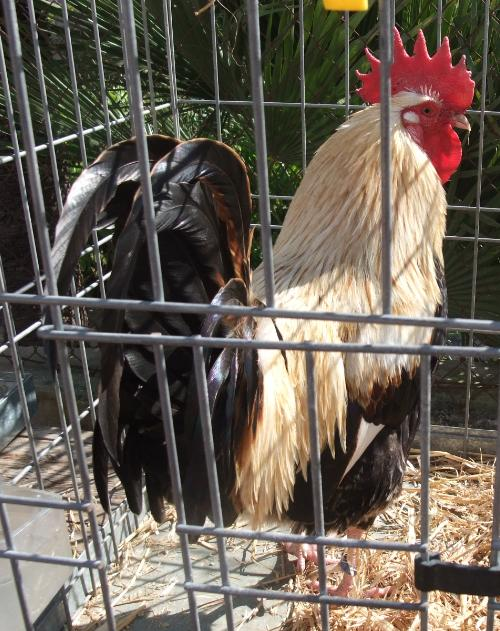 Gall mallorquí ros a la fira de Santa Eugènia, Mallorca